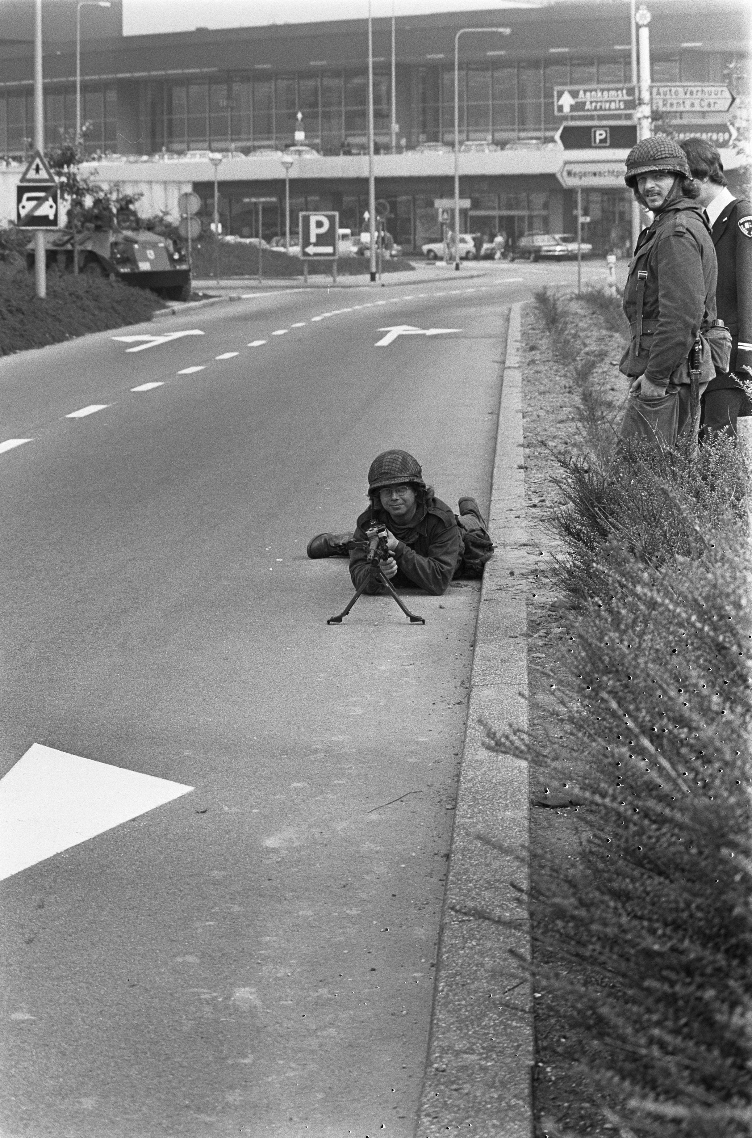 Collectie / Archief : Fotocollectie Anefo Reportage / Serie : [ onbekend ] Beschrijving : Gijzelingsdrama Den Haag , verhoogde paraatheid op Schip soldaat met machinegeweer liggend op verkeersweg naar stationsgebouw Datum : 17 september 1974 Locatie : Noord-Holland, Schiphol Trefwoorden : gijzelingen, soldaten Fotograaf : Croes, Rob C. / Anefo Auteursrechthebbende : Nationaal Archief Materiaalsoort : Negatief (zwart/wit) Nummer archiefinventaris : bekijk toegang 2.24.01.05 Bestanddeelnummer : 927-4572